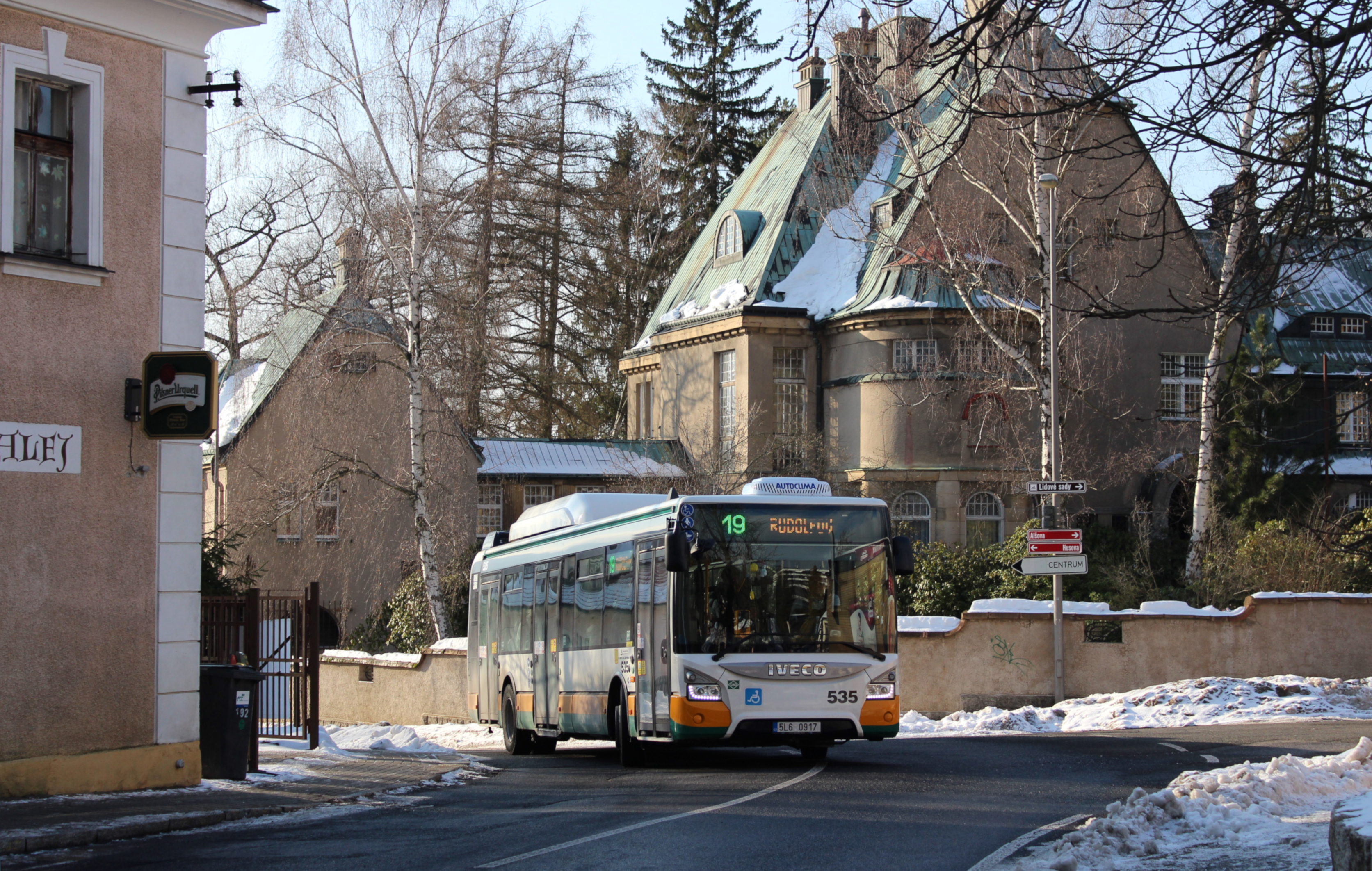 Iveco Urbanway ev.č. 535 na lince 19 v Liberci u zastávky Březová alej